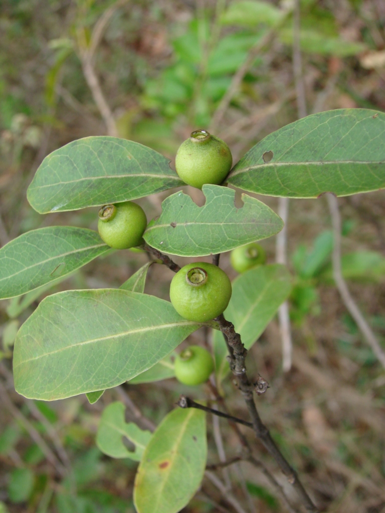 Alibertia sessilis - RUBIACEAE Jardim Botânico de Brasília - Distrito Federal - Brasil.